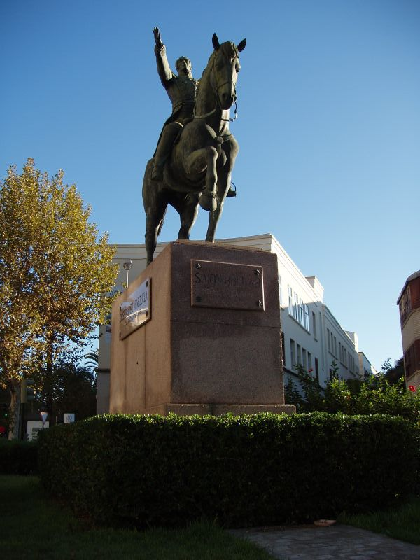 Monumento a Simón Bolívar en Cádiz, España.